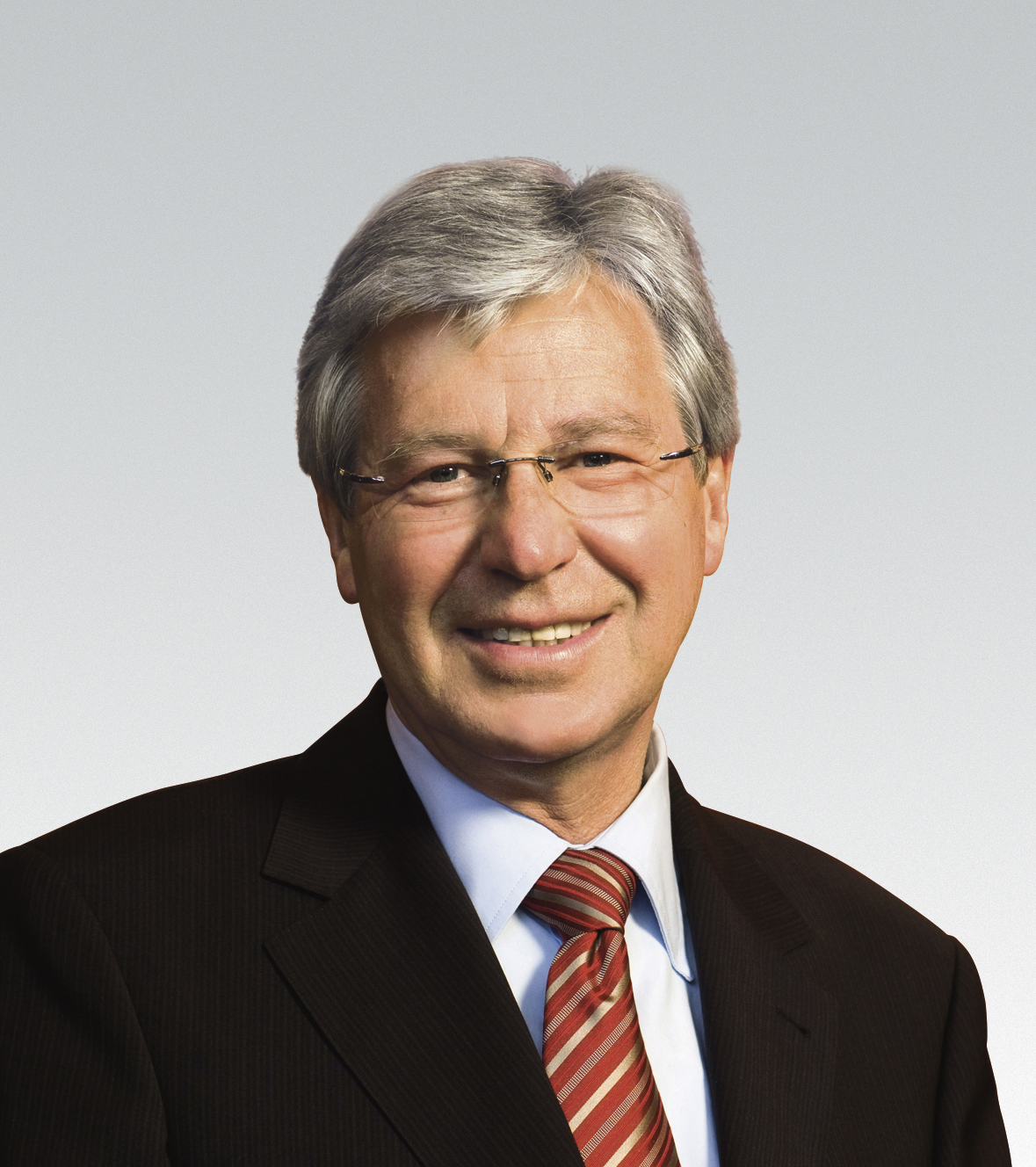 Portraitfoto von Bremens Bürgermeister Jens Böhrnsen